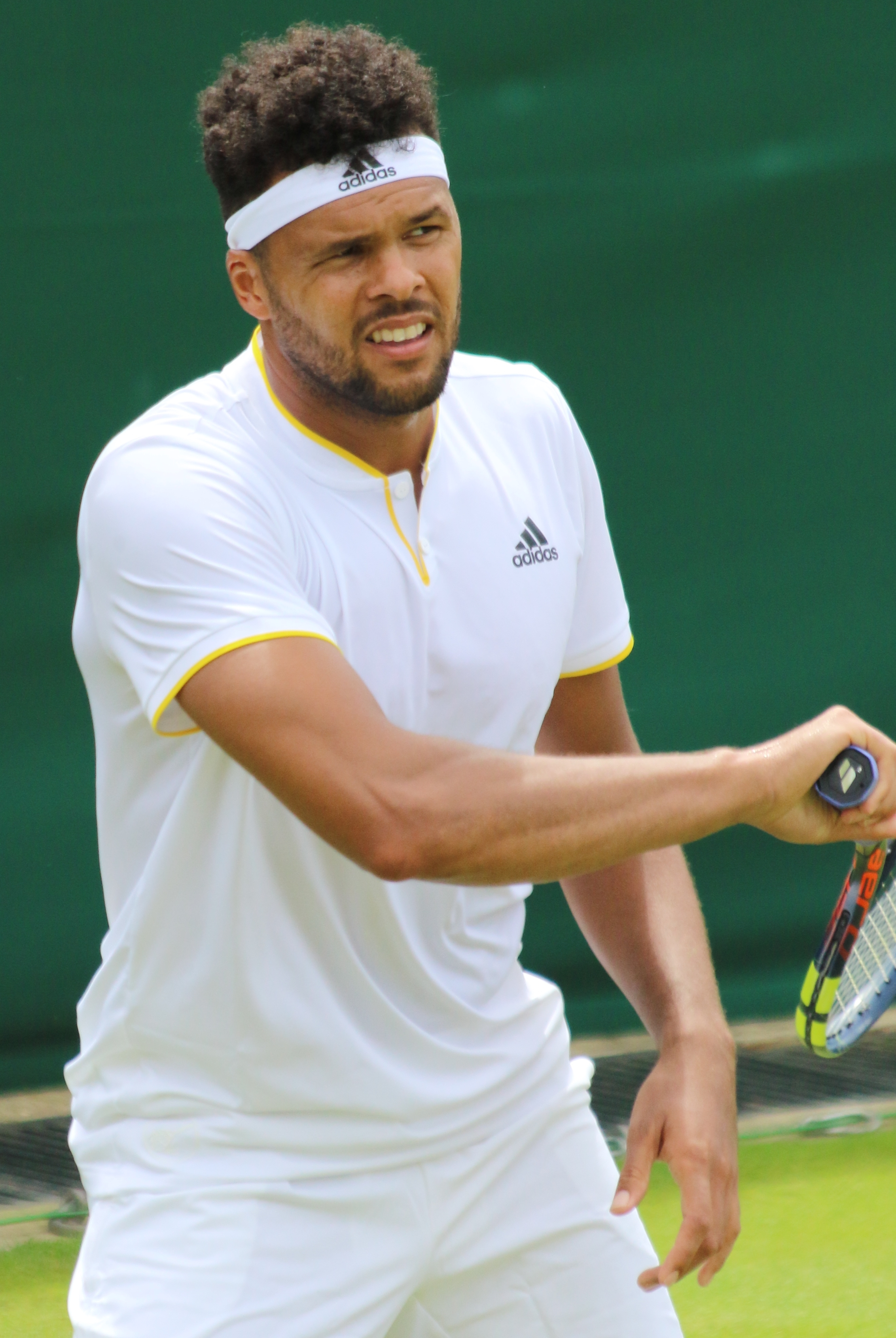 Tsonga WM17 (15)